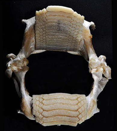 Myliobatis freminvillii